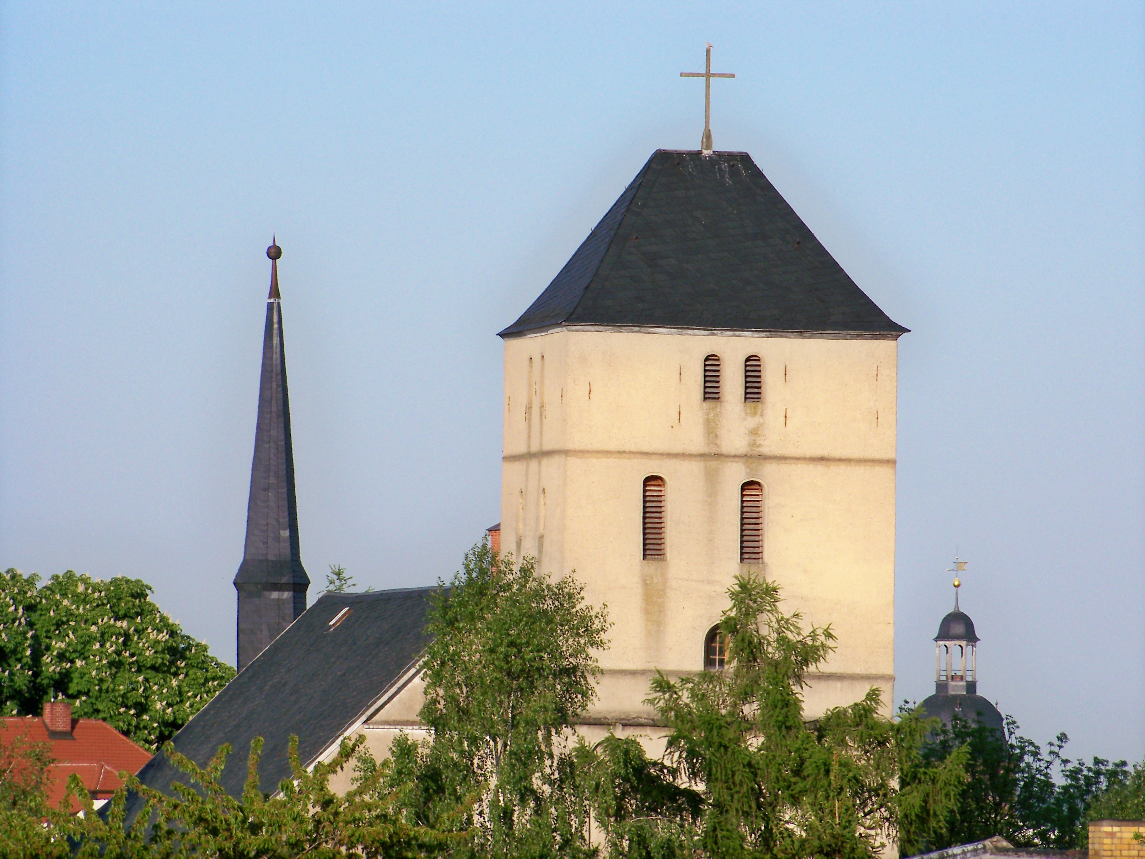 Marienkirche in Eilenburg